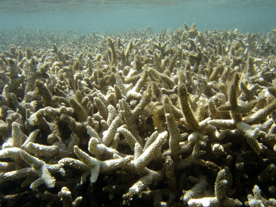 Récif corallien (Acropora) (Ile de la Réunion)